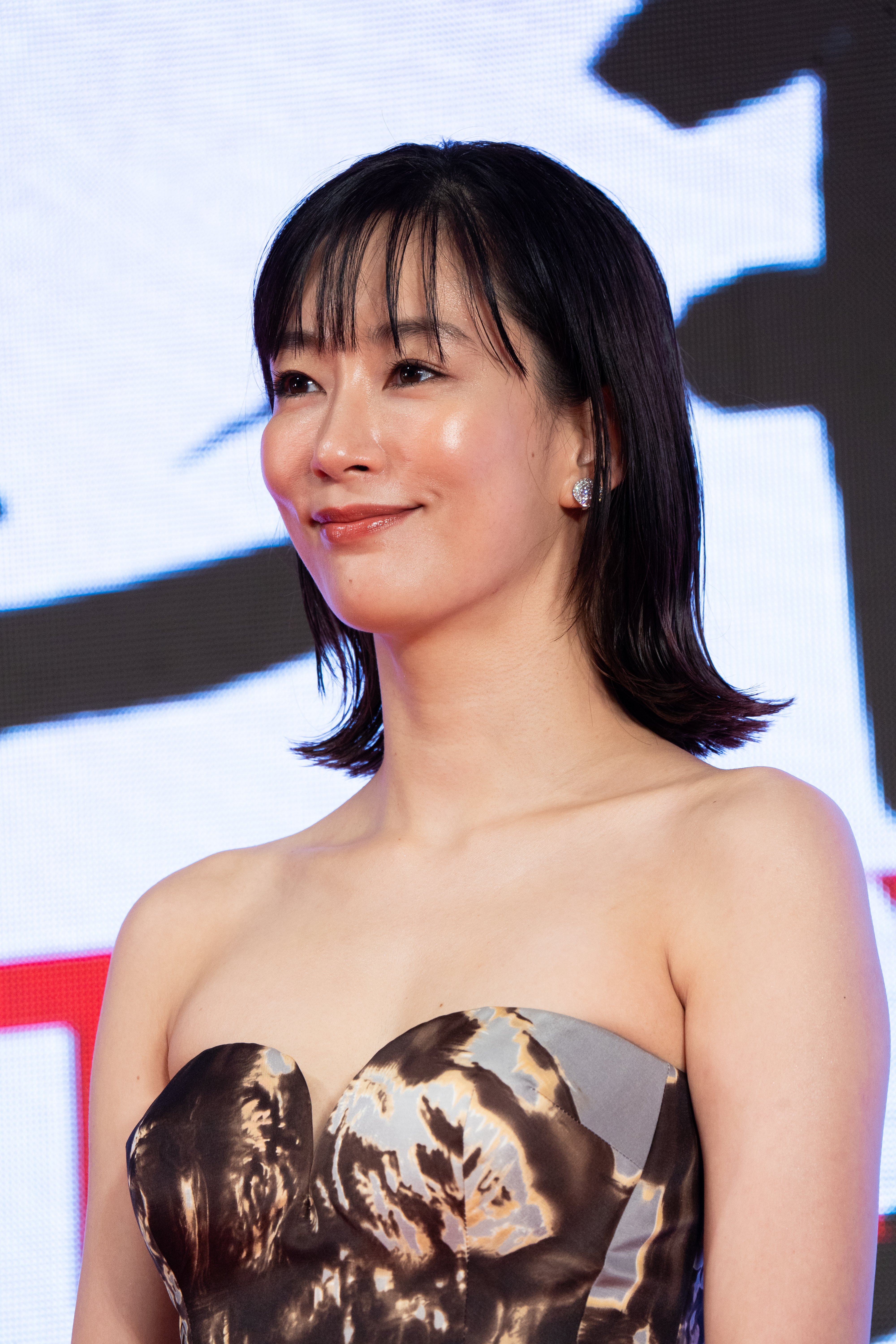 第32回 東京国際映画祭 オープニングセレモニー 水川あさみ (喜劇 愛妻物語)